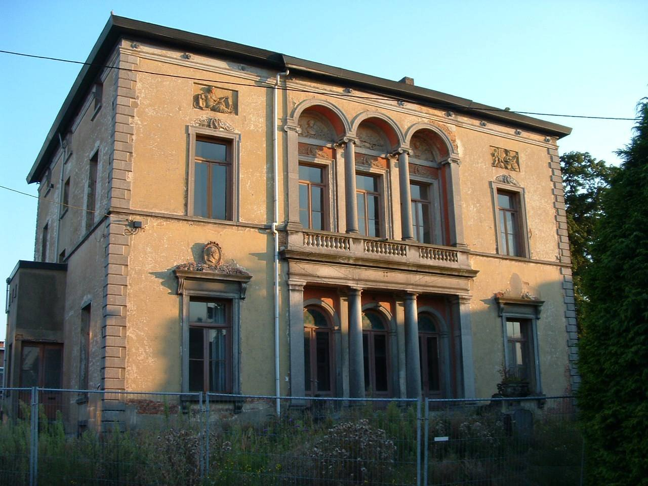 Villa Servais, Servaislaan 8, Halle